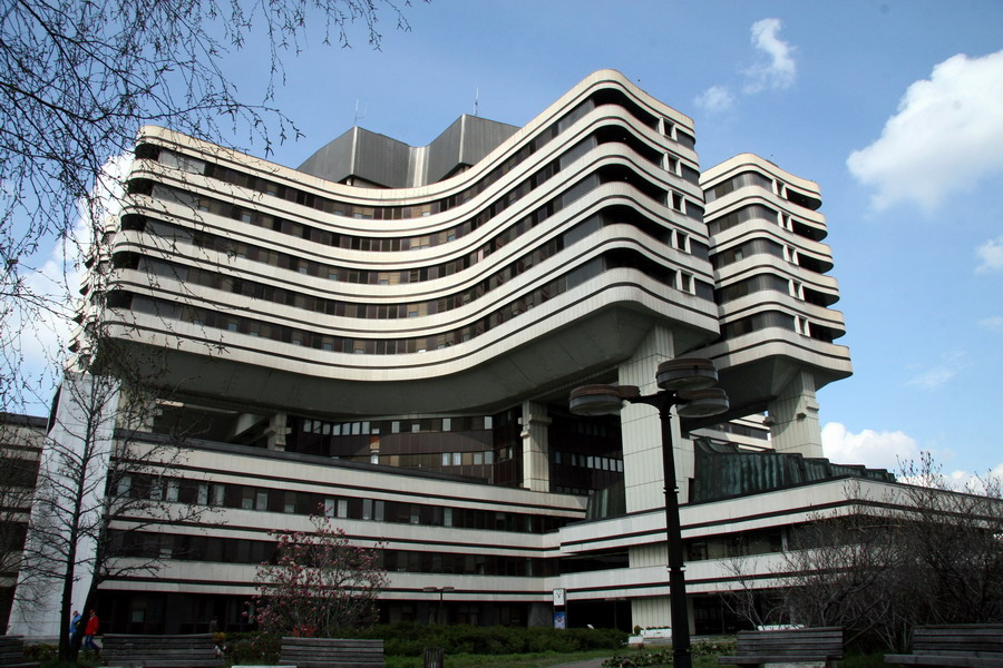 Зграда Војномедицинске академије